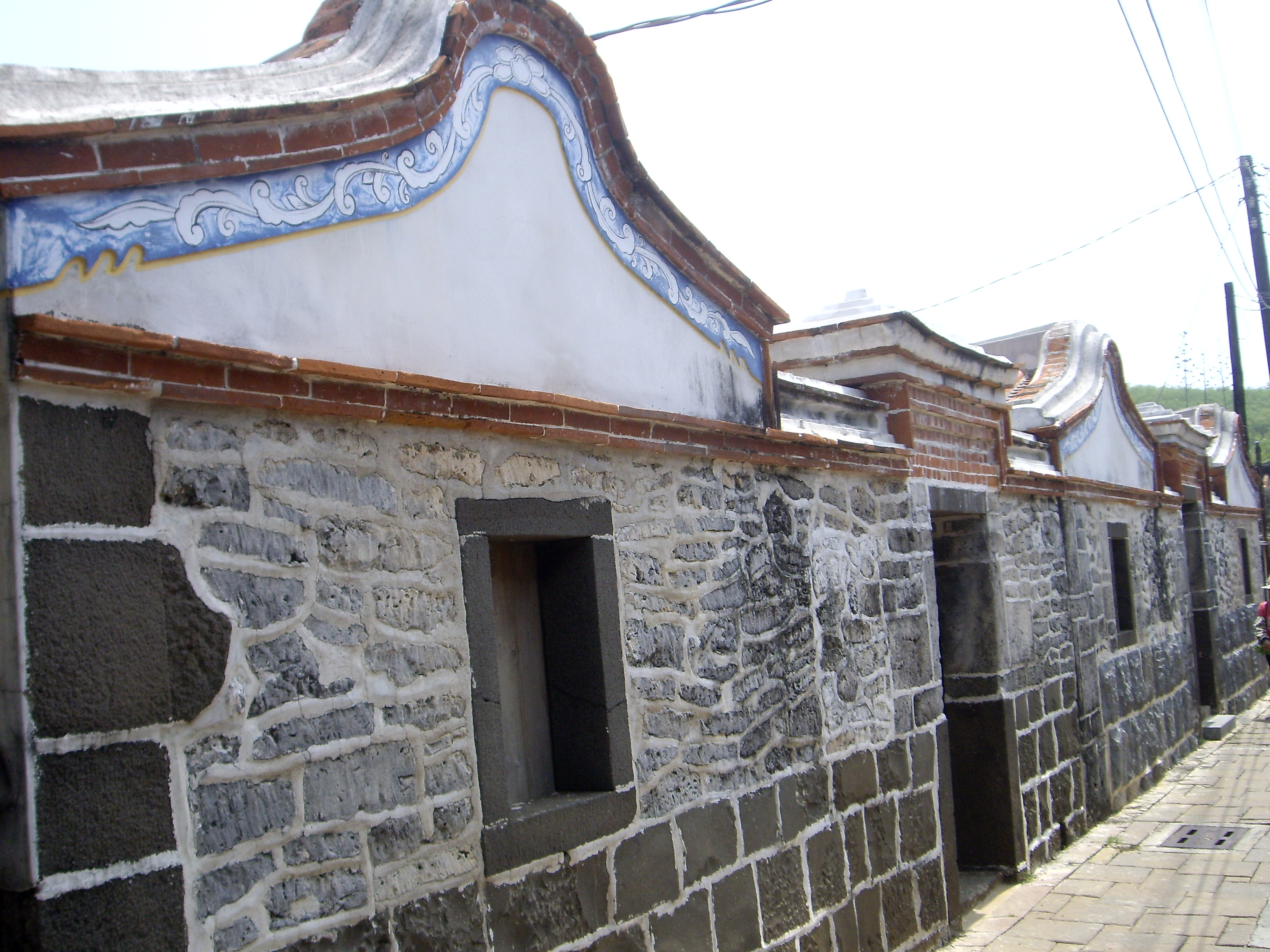 中文（台灣）: 臺灣澎湖縣望安島中社古厝